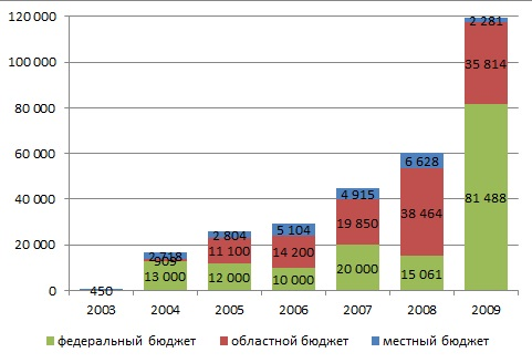 Источники финансирования строительства жилья для переселения населения из ветхого и аварийного жилищного фонда. Источники: 2003-2008 годы: (страница 7), 2006-2009: (страница 42)